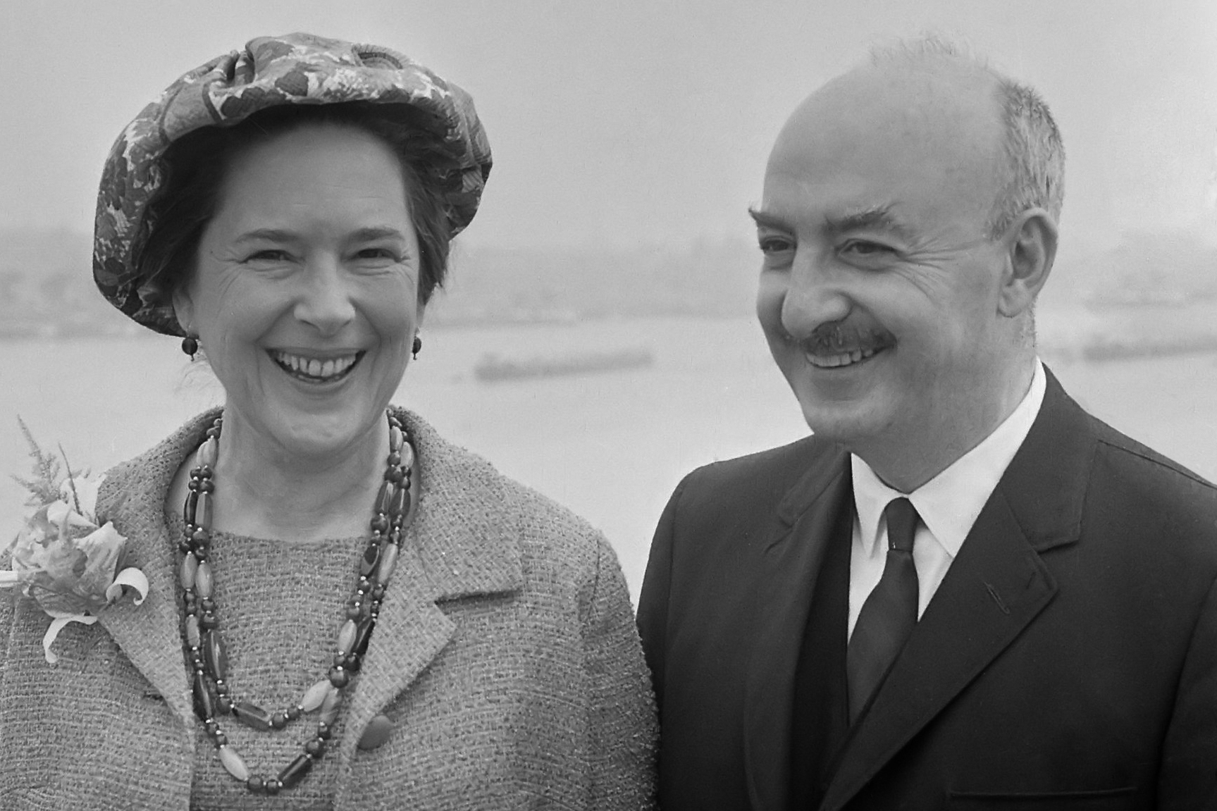 Nieuwe Amerikaanse ambassadeur H. Tyler en echtgenote in Nederland, op de SS Rotterdam 12 juni 1965